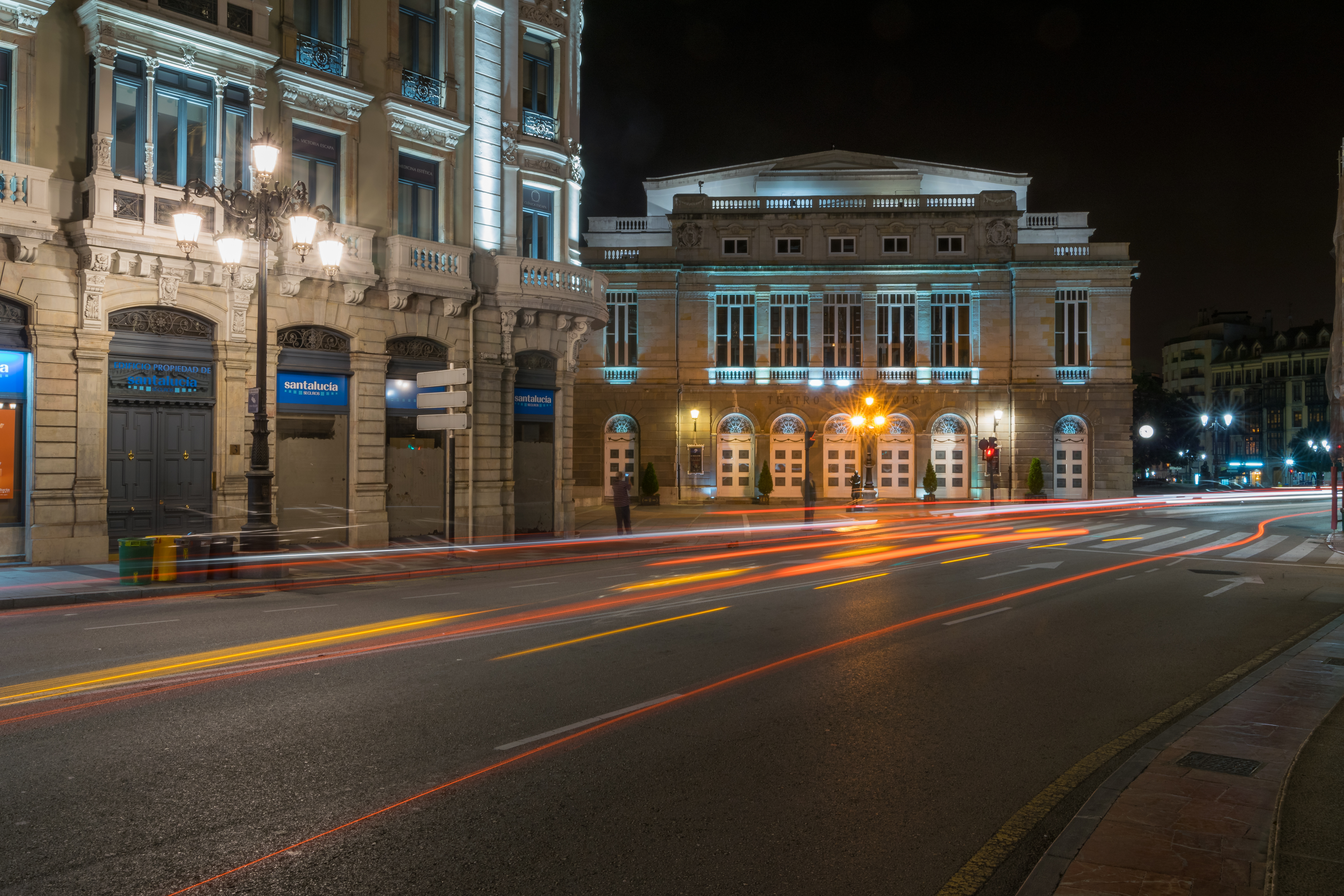 Vista nocturna del Teatro Campoamor en Oviedo